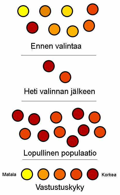 Luonnonvalinnan vaikutus bakteerien vastustuskykyyn antibiootille.